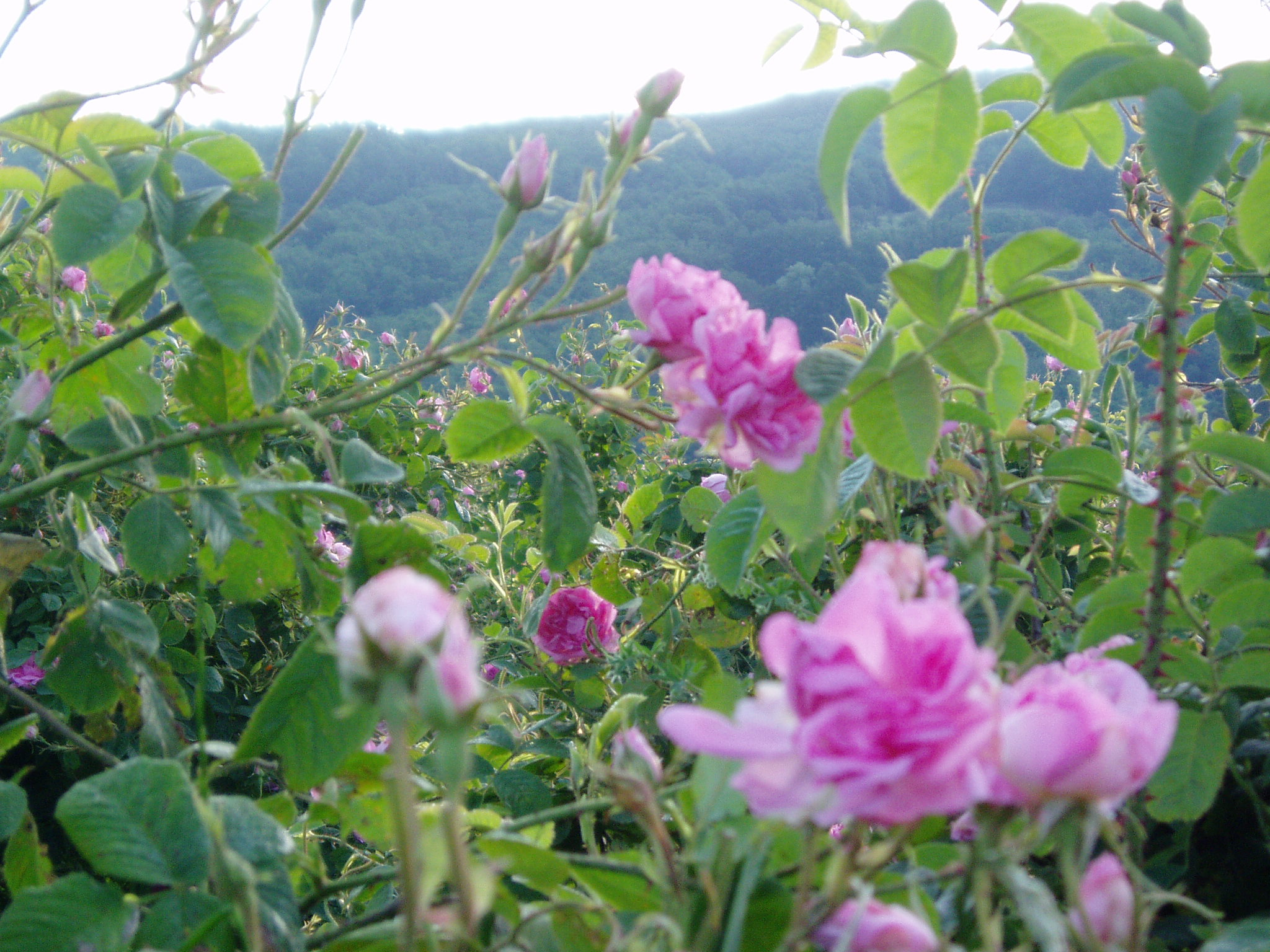 розови насаждения в с.Златосел